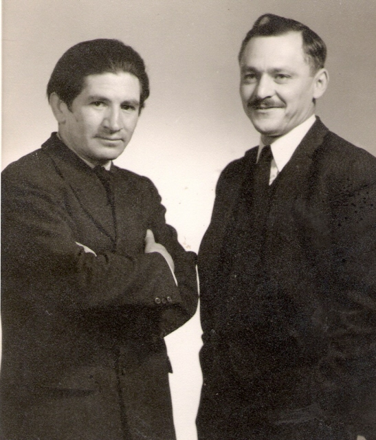 Fotografía de archivo familiar del escultor Rómulo Rozo y el embajador Miguel A. Menendez en una recepción en la Embajada de México en Colombia, 1942.